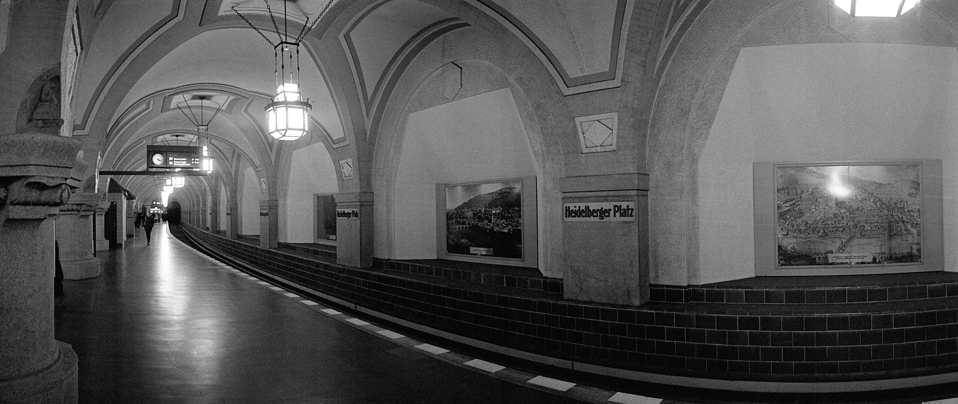 Panoramaaufnahme der U-Bahnstation. Die Spezialkamera (Typ "Horizont") ermöglicht dabei gleichzeitig einen Blick entlang des Bahnsteigs sowie senkrecht dazu.